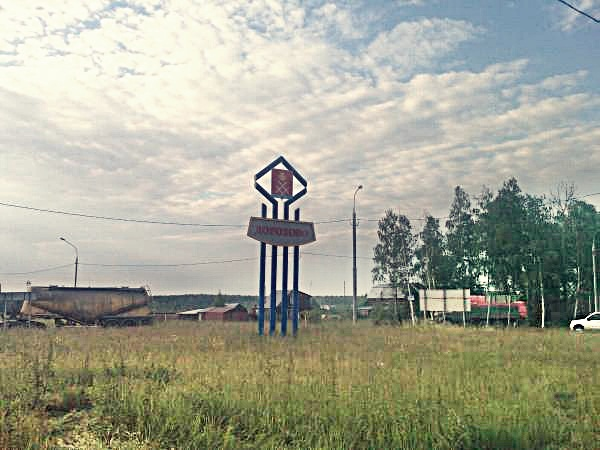 Круг на Московской улице в Дорохово.